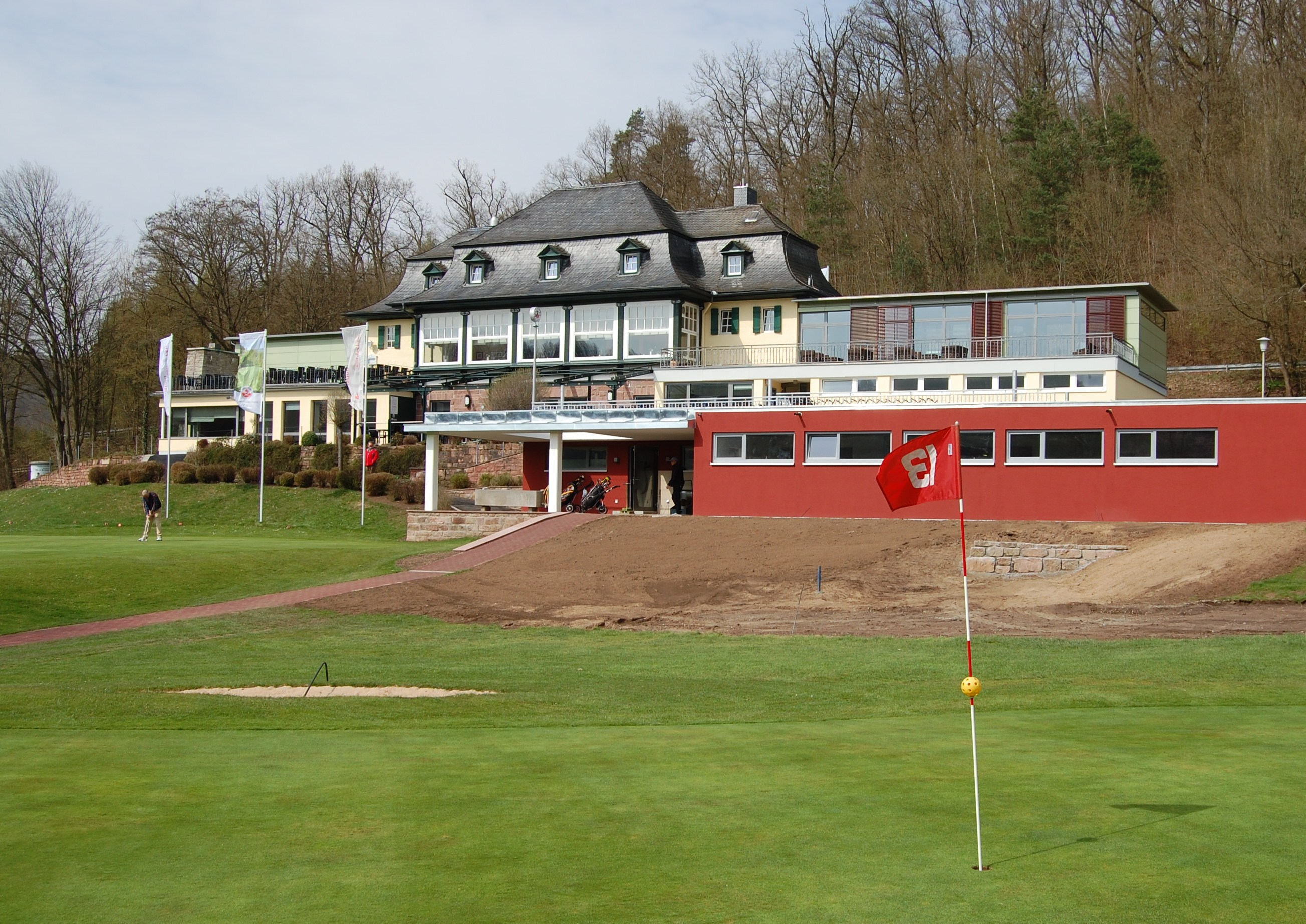 Das Vereinshaus des Golfclubs Bad Kissingen im Jahre 2010 nach Renovierung und Erweiterung anlässlich des 100-jährigen Jubiläums des Golfclubs (1910-2010)